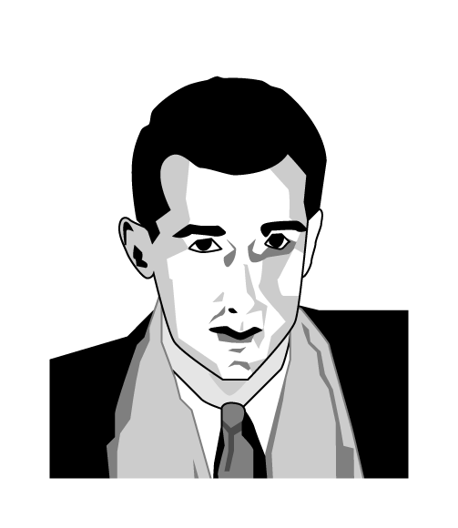 Pierre Delaire